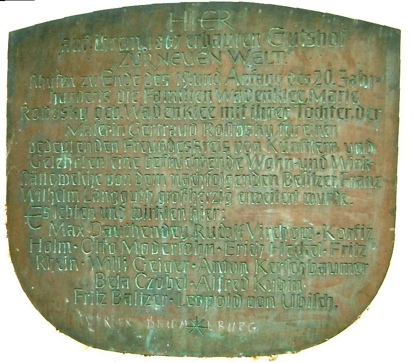 Gedenktafel am ehemaligen Gutshof "Neue Welt" Leutfresserweg 32, Würzburg